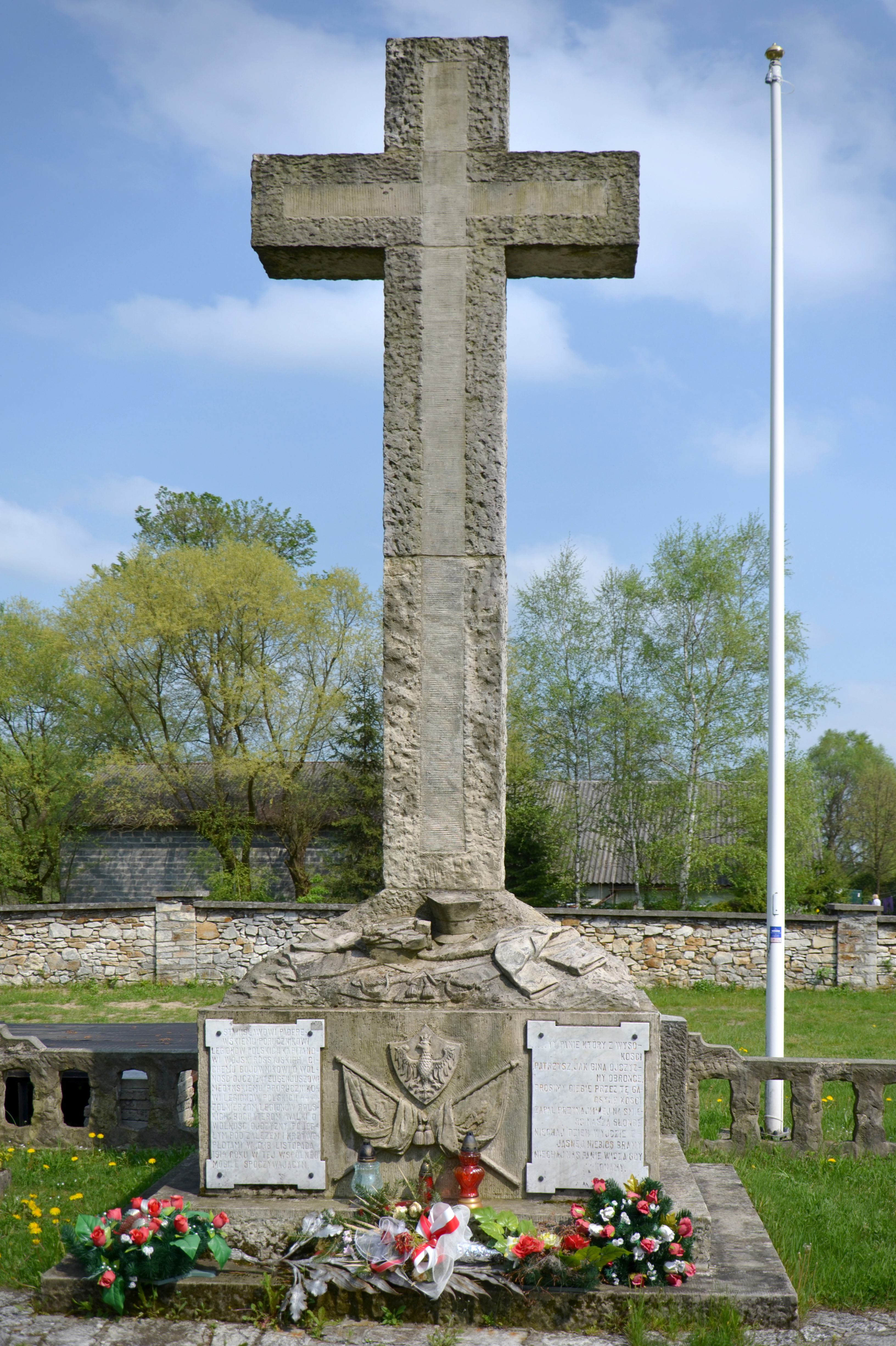 Pomnik żołnierzy 1 Pułku Piechoty Legionów poległych w bitwie pod Krzywopłotami